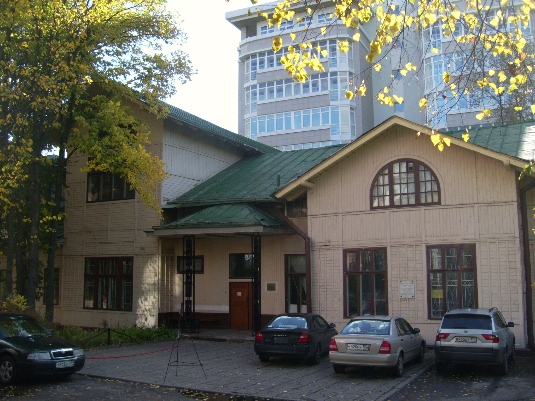 Москва, проезд Загорского, дом 23. Первоначально — дача банкира Юнкера. После национализации в здании располагался Кунцевский волостной исполком. В 1970-х годах — Кунцевский дом пионеров, в 1990-х — Кунцевский краеведческий музей. В настоящее время в здании находится факультет дизайна Института современного искусства.